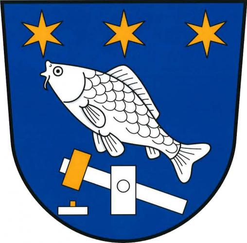 znak, Val, okres Tábor